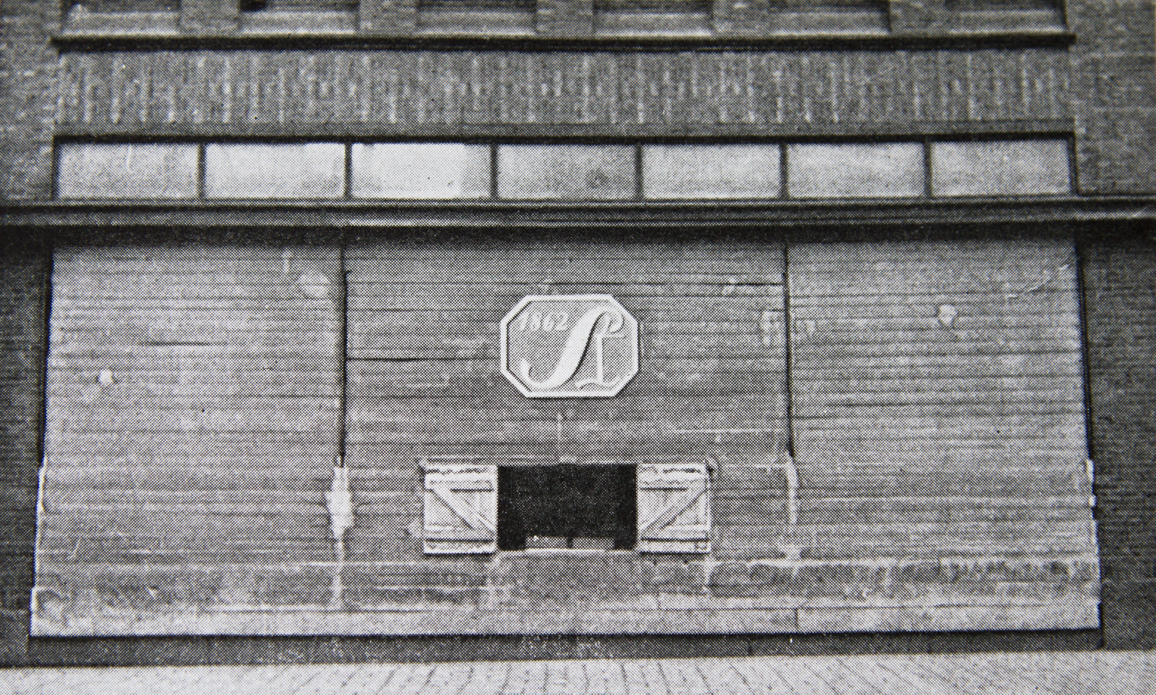 Talvisodan alkupäivillä Stockmannin tavaratalon näyteikkunat suojattiin vanerisilla sirpalesuojilla.